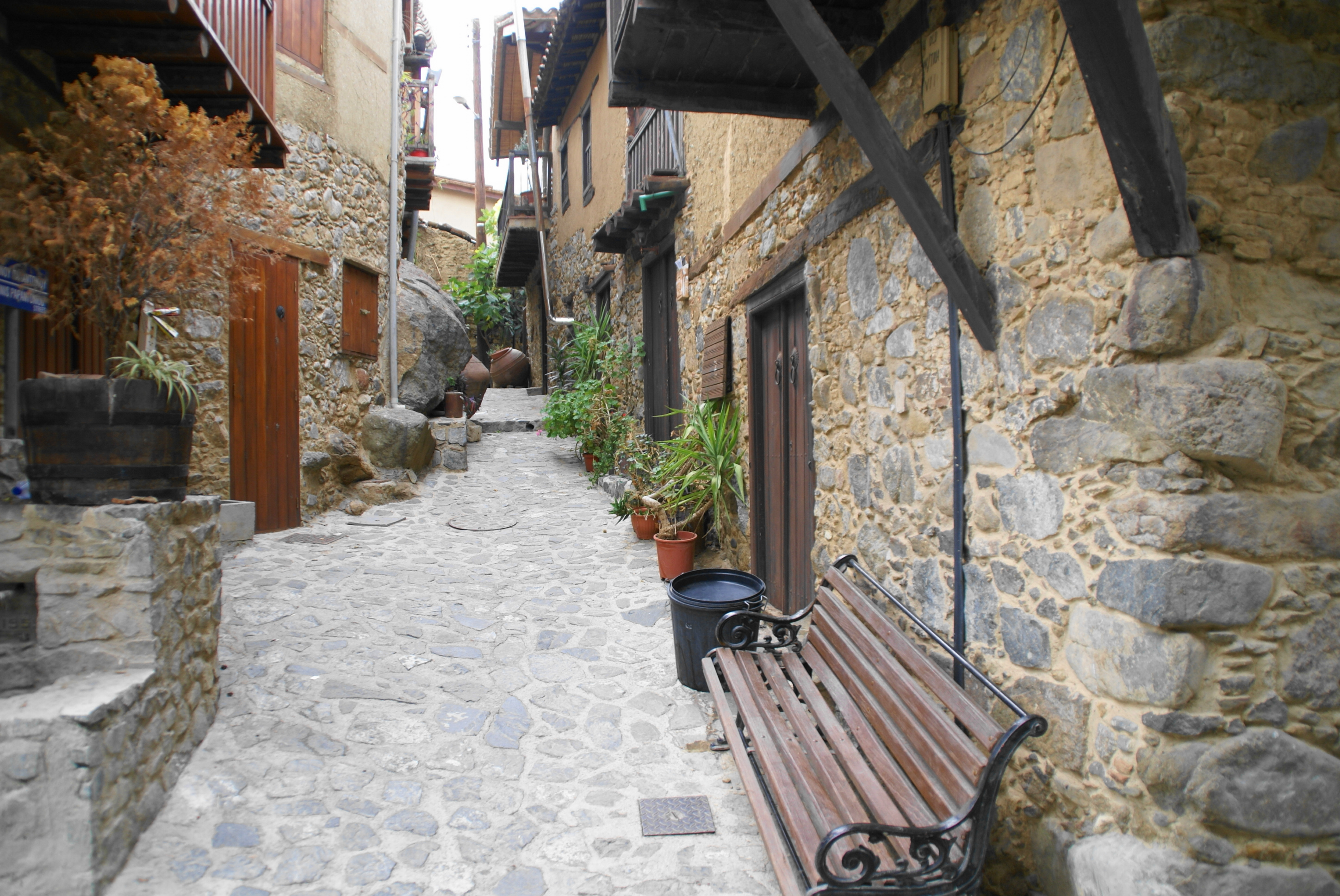 Kakopetria - ein idyllischer Ort im Troodos